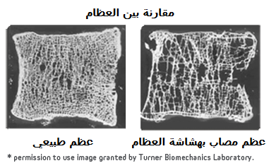 شرائح لنسيج عظمي سليم وآخر مصاب بهشاشة العظام (تخلخل العظام)